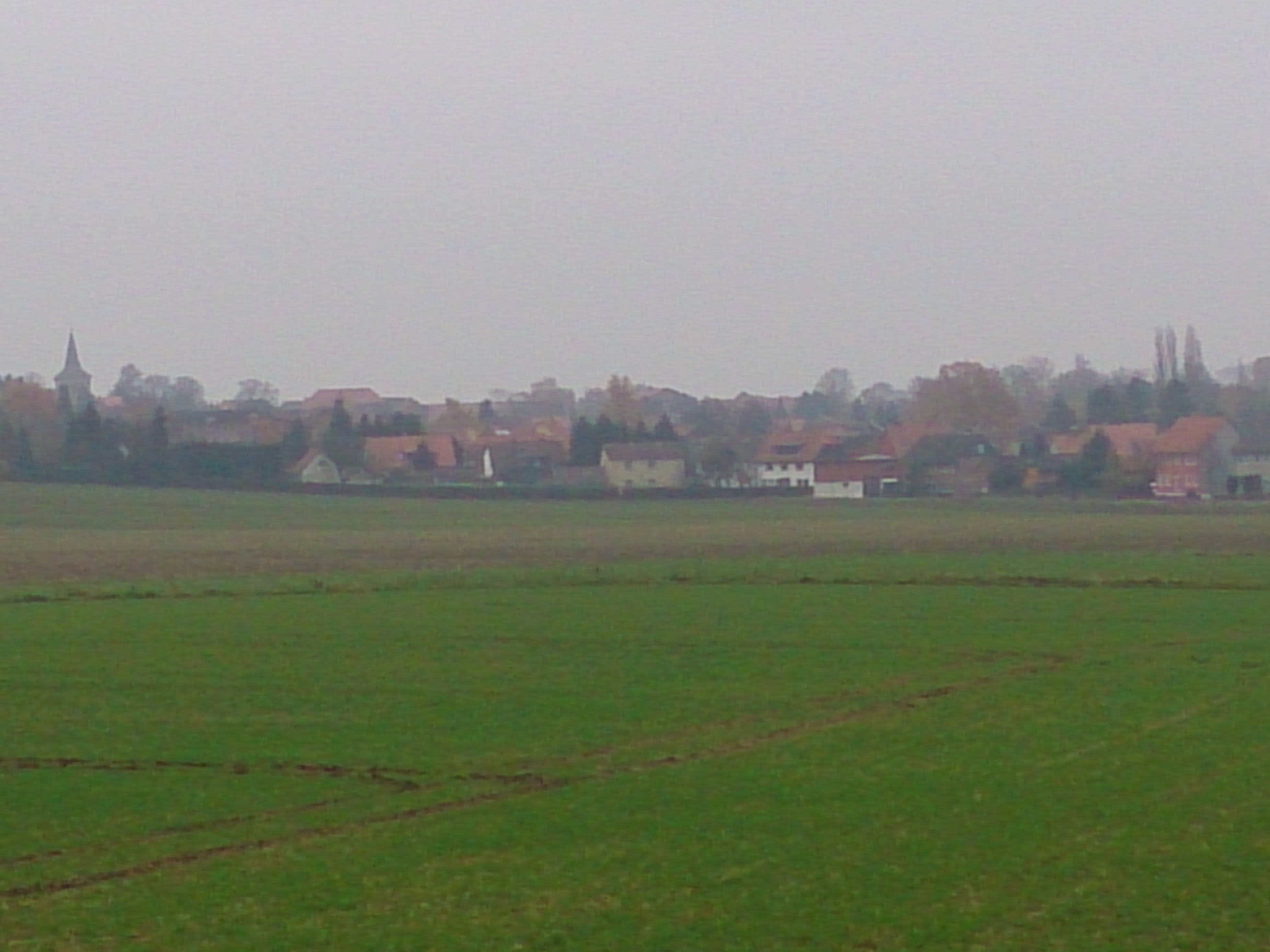 Ortsansicht von Westen im November 2013